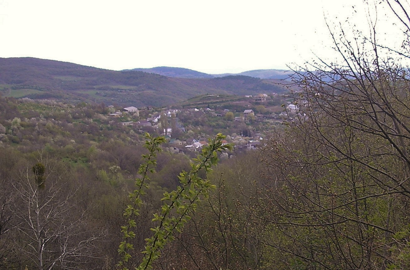 Село Генеральське, Крим